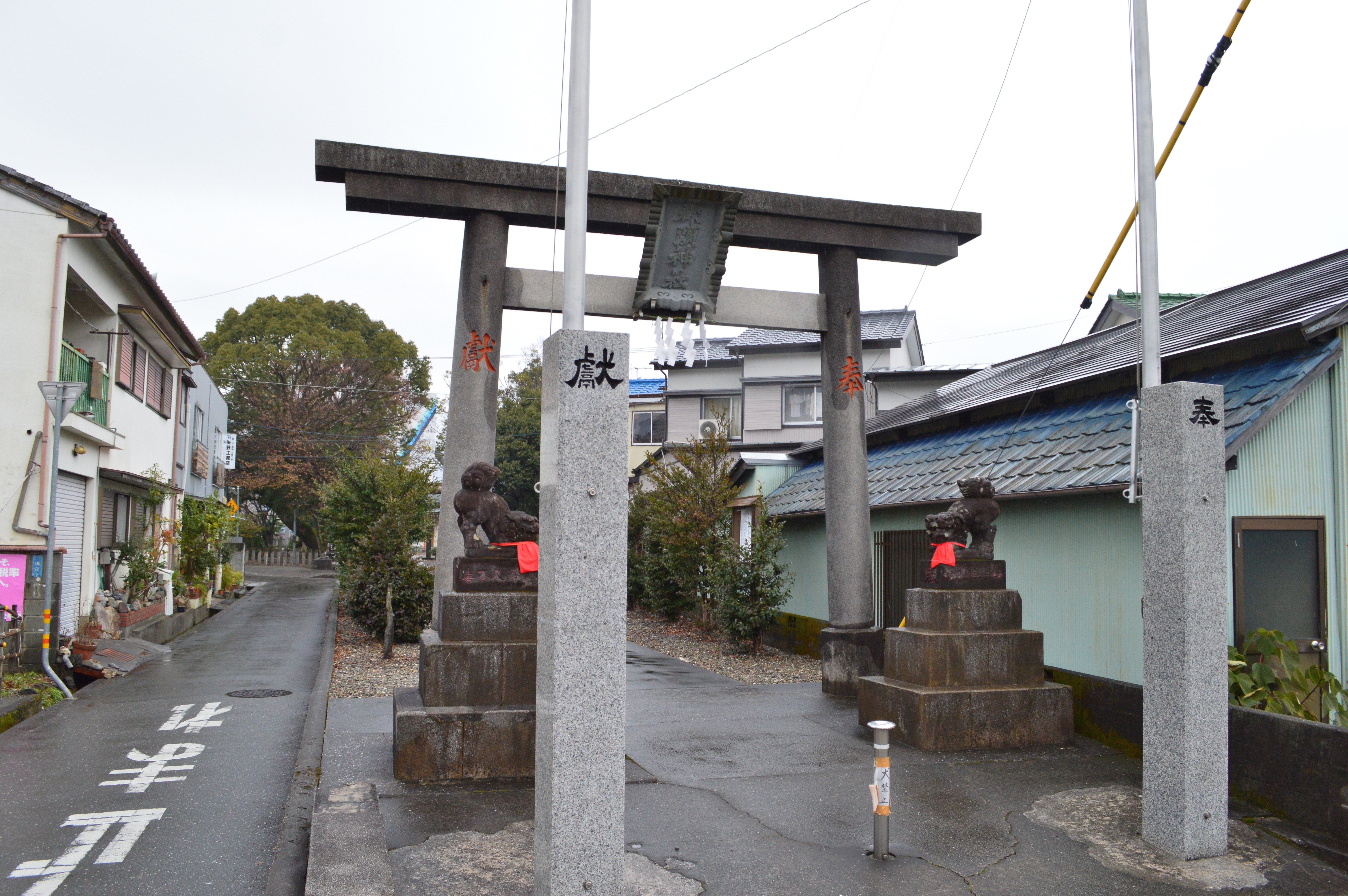 郡頭神社 鳥居